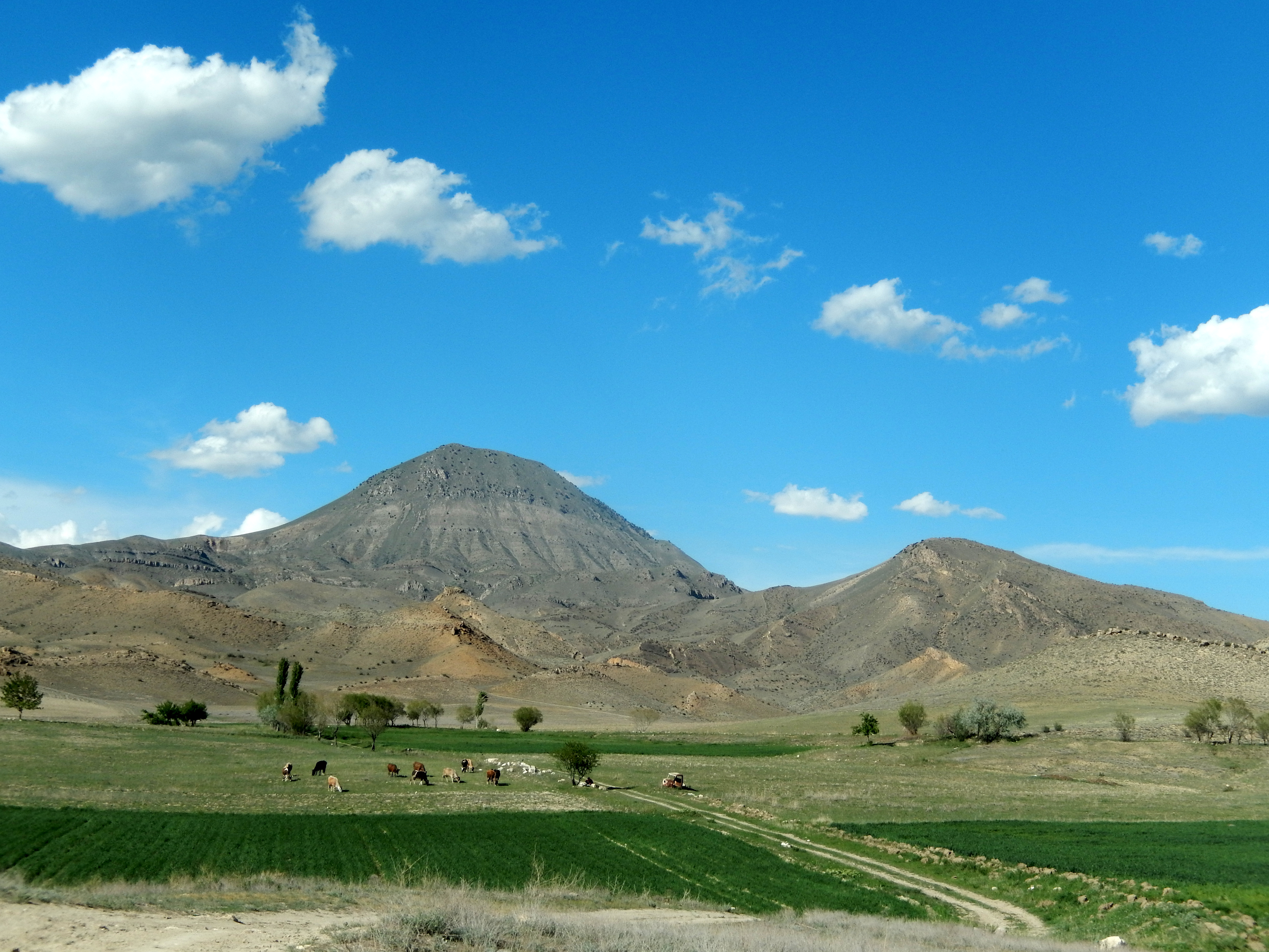 Ուրծի լեռներ